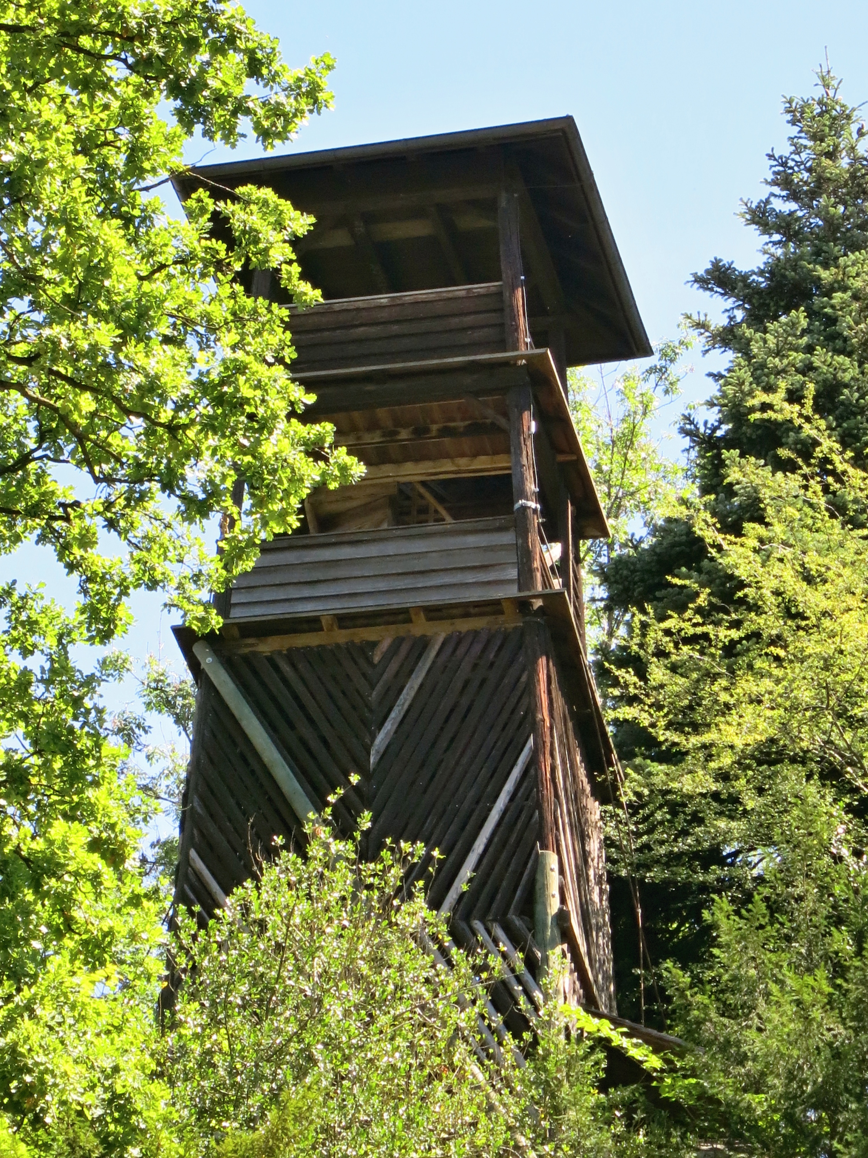 Gletschergartenturm